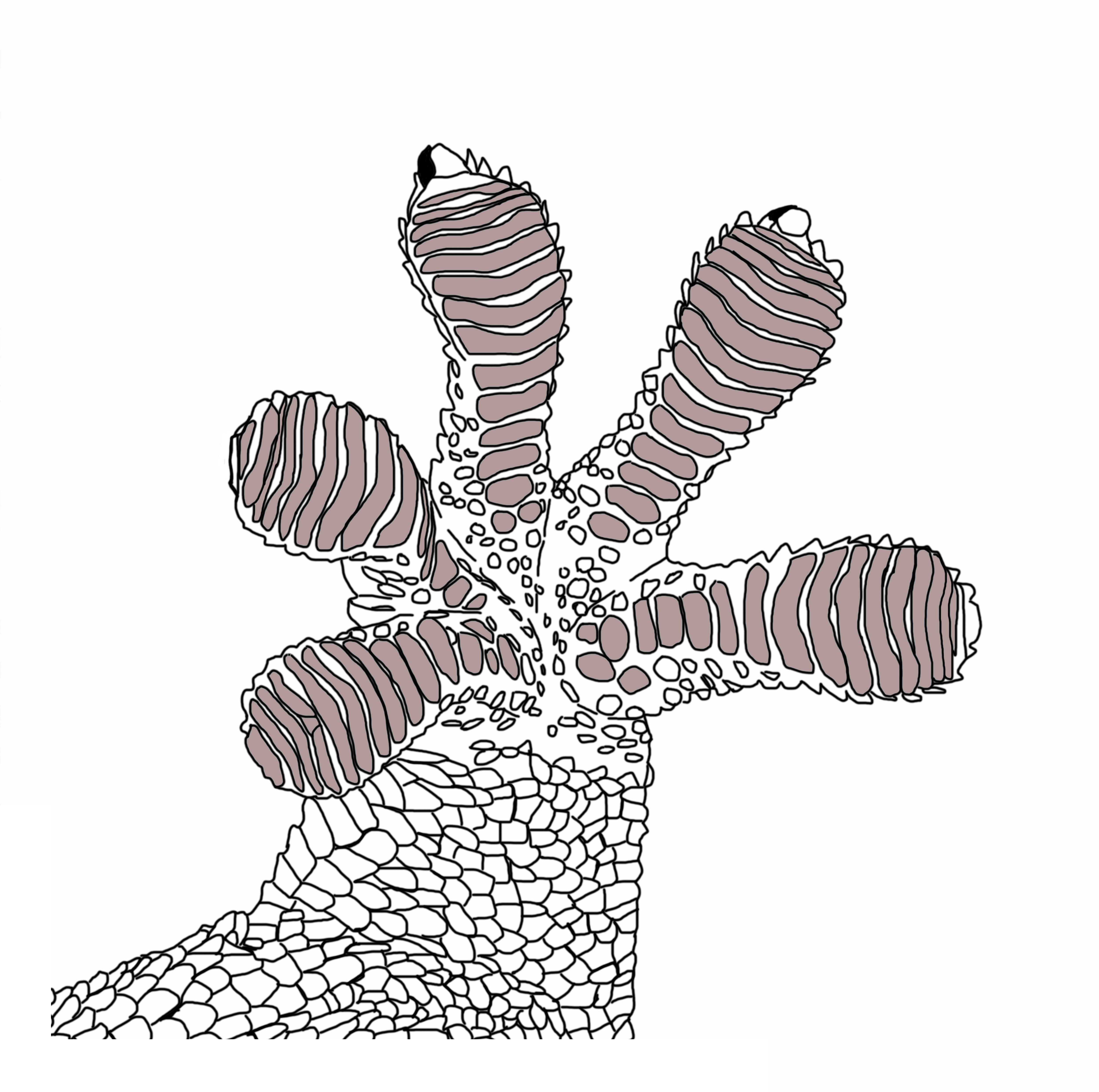 Geckofuß Mauergecko Schema